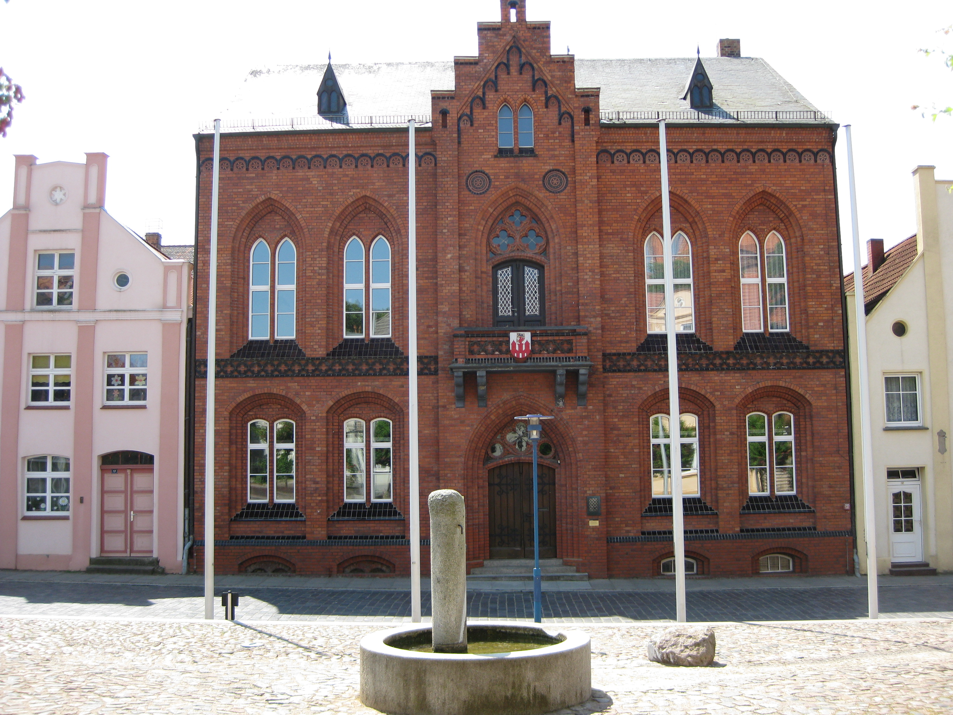 Neugotisches Gebäude des Amtes Rechnitz-Trebeltal am Marktplatz von Tribsees (mit Brunnen).